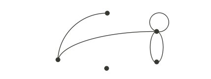 Գրաֆի պարզագույն պատկերում